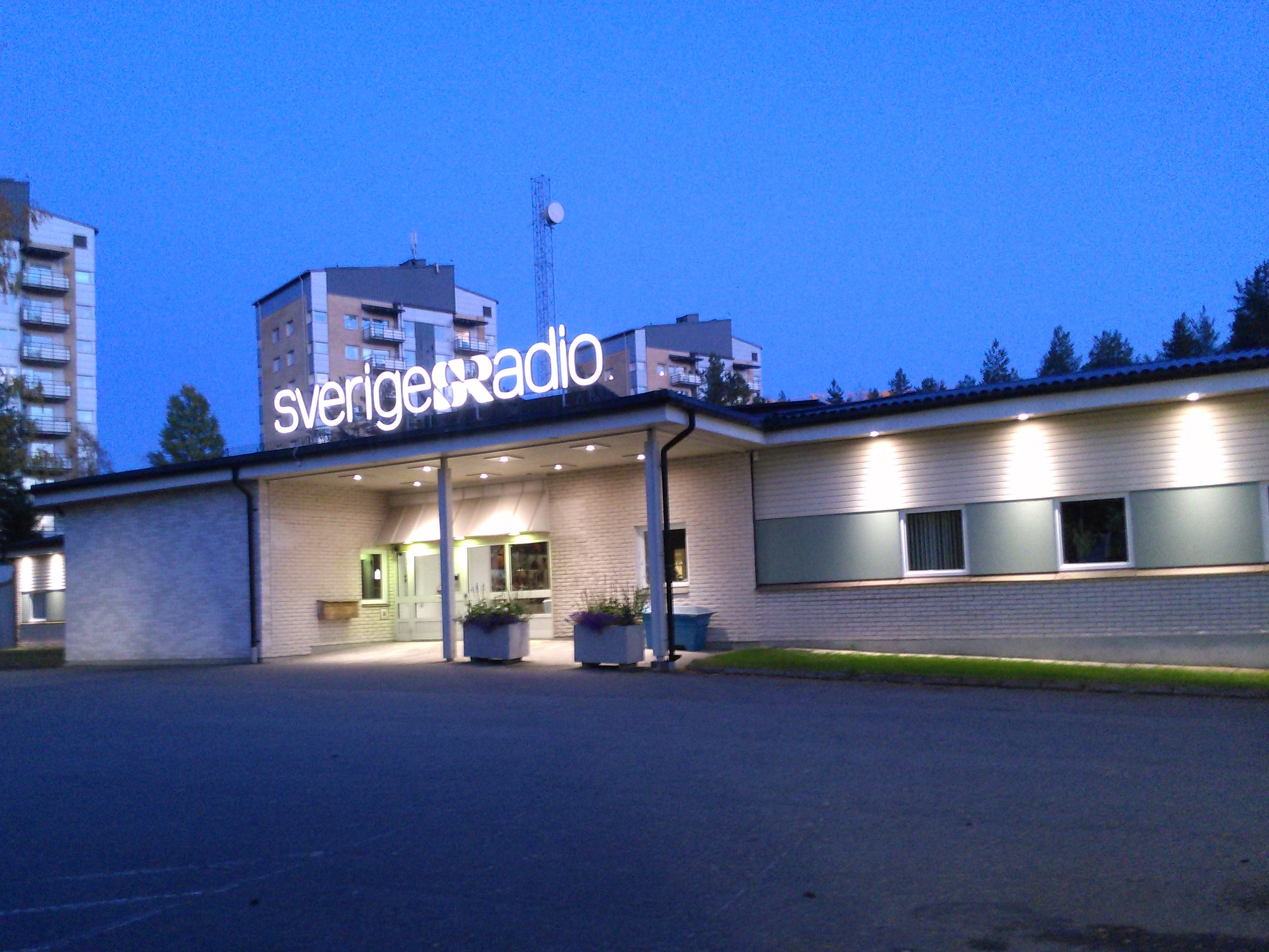 Radiohuset för Sveriges Radio P4 Västerbotten i Umeå.